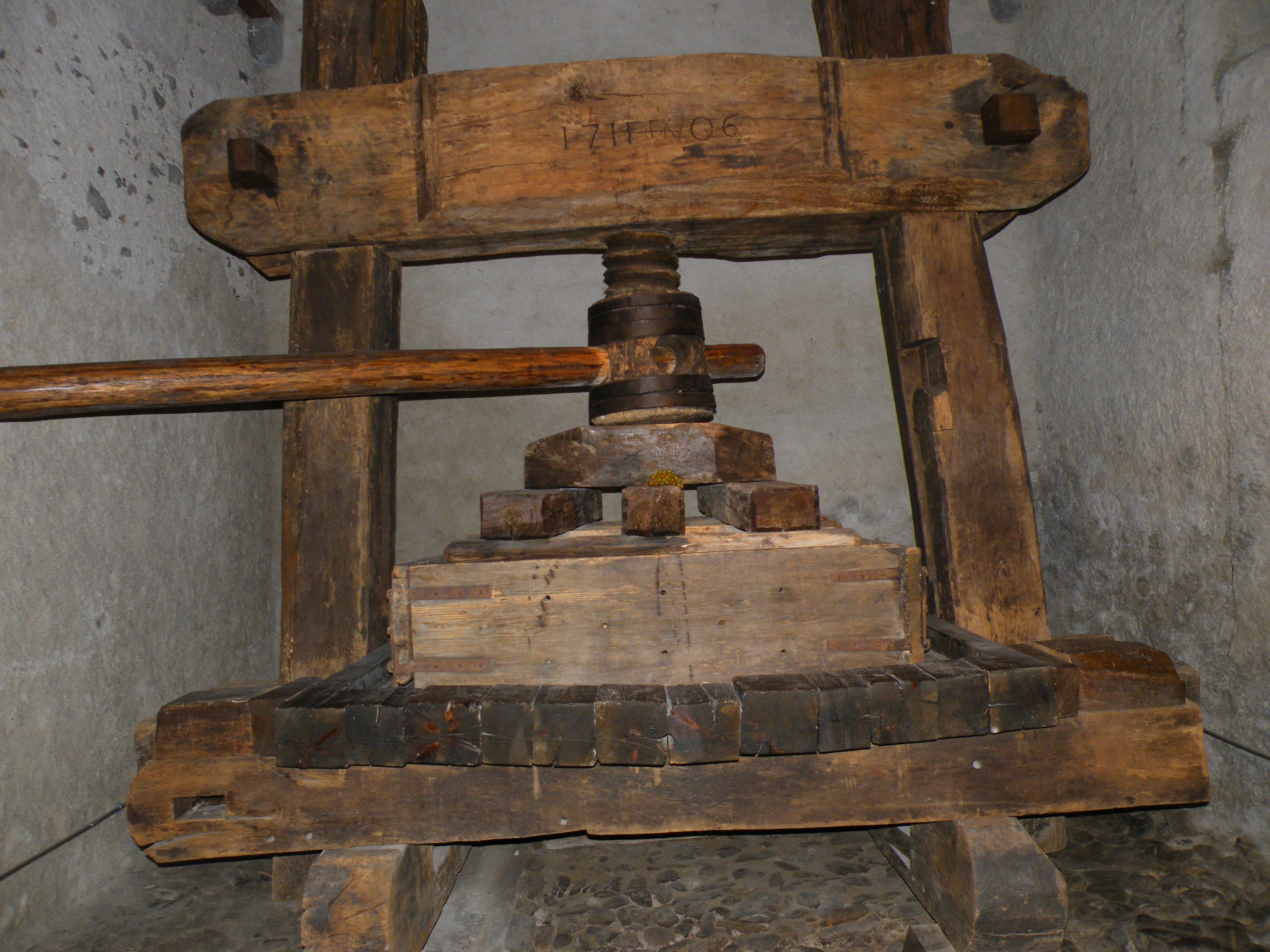 Viinin puristin, 1700-luvun alusta, Chateau de Aigle/ Aiglen linna, Sveitsi